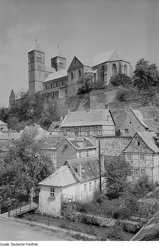 Original image description from the Deutsche Fotothek Quedlinburg. Stiftskirche St. Servatius, Blick von der Wassertorstraße?